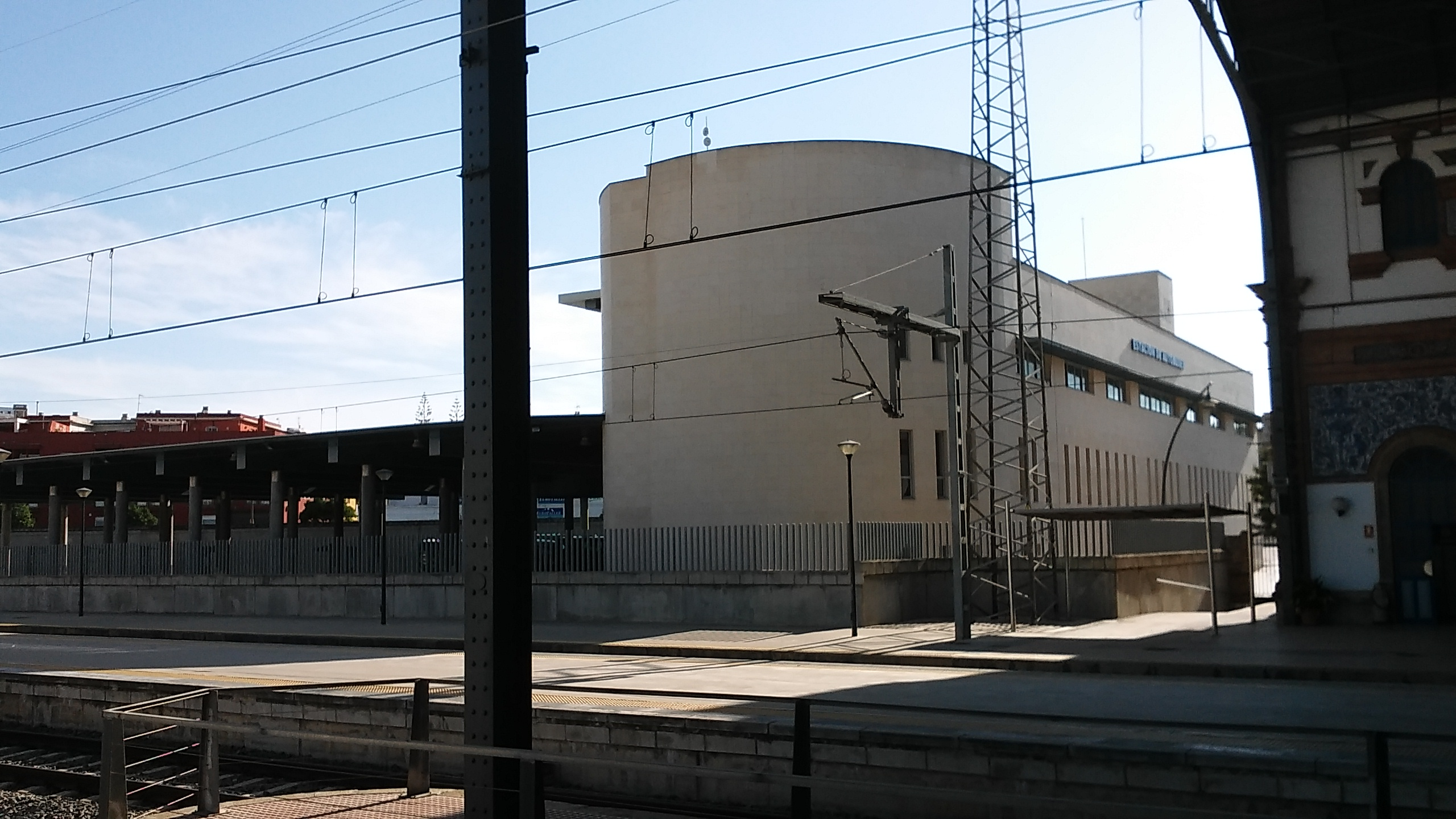 Estación autobuses Jerez desde los andenes de la estación de ferrocarriles